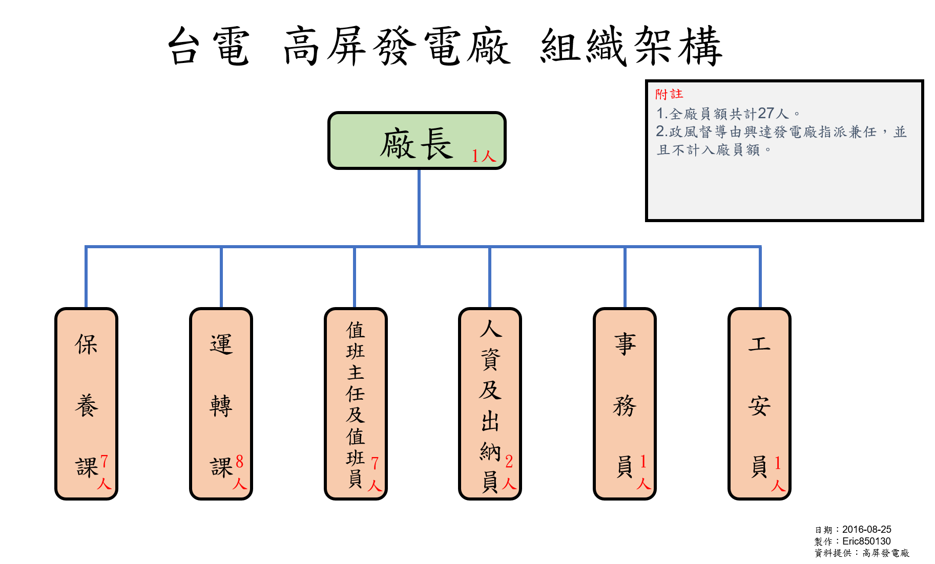 高屏發電廠 組織架構